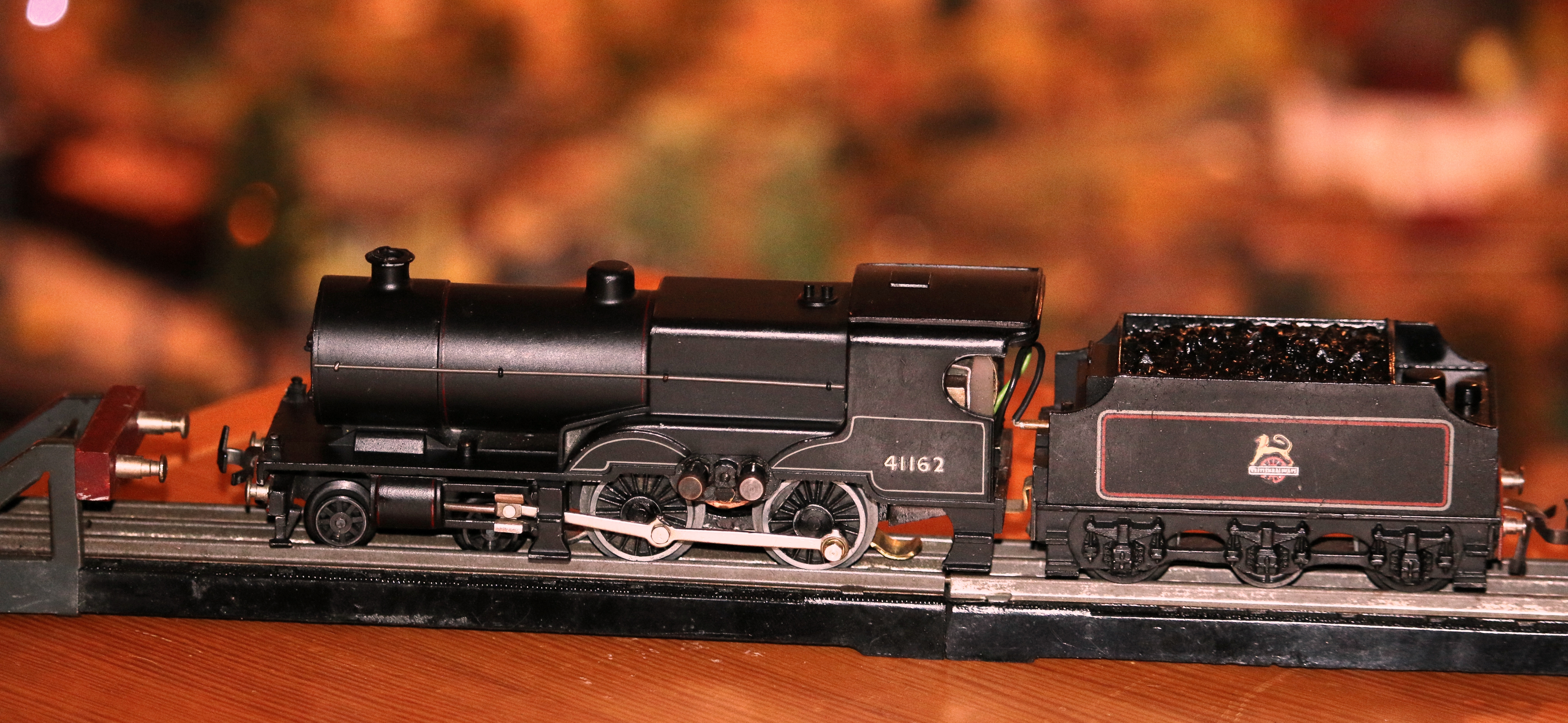 Modell der englischen Herstellers Trix Twin Railway, Wechselstromausführung